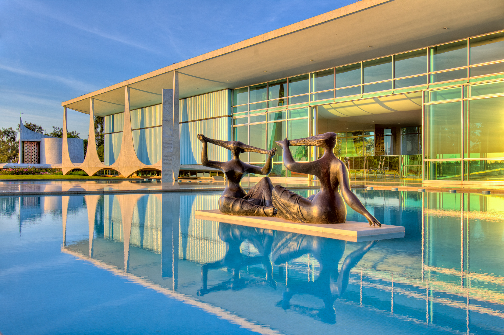 Palácio da Alvorada. Foto: Ichiro Guerra O Ministério da Cultura, por meio do Instituto do Patrimônio Histórico e Artístico Nacional (Iphan), homologou o tombamento de um conjunto de 27 obras do arquiteto Oscar Niemeyer, localizadas em Brasília, Rio de Janeiro e São Paulo. As obras passam agora a ser protegidas pelo Iphan como Patrimônio Cultural Brasileiro. São elas: o Museu da Cidade, o Espaço Lúcio Costa, o Panteão da Liberdade e Democracia, o Teatro Nacional, o Memorial JK, o Memorial dos Povos Indígenas, o Conjunto Cultural Funarte, o Espaço Oscar Niemeyer, o Conjunto Cultural da República, o Edifício do Touring Club do Brasil, a Praça dos Três Poderes, a Casa de Chá, Pombal, o Palácio da Justiça, o Palácio Itamaraty e anexos, a Capela Nossa Senhora de Fátima, o Conjunto do Palácio da Alvorada, o Congresso Nacional, o Palácio do Planalto, o Supremo Tribunal Federal, os prédios dos Ministérios e anexos, o Quartel General do Exército, o Palácio Jaburu, todos esses localizados em Brasília (DF). Além dos bens listados na capital federal, estão protegidos também a Casa das Canoas (RJ), o Conjunto da Passarela do Samba (RJ), o Museu de Arte Contemporânea (RJ), o Conjunto do Parque do Ibirapuera – especificamente, a Grande Marquise, o Palácio das Nações (Pavilhão Manoel da Nóbrega), o Palácio dos Estados (Pavilhão Francisco Matarazzo Sobrinho), o Palácio das Indústrias (Pavilhão Armando de Arruda Pereira), o Palácio de Exposições ou das Artes (Pavilhão Lucas Nogueira Garcez, conhecido como "Oca") e o Palácio da Agricultura (SP).